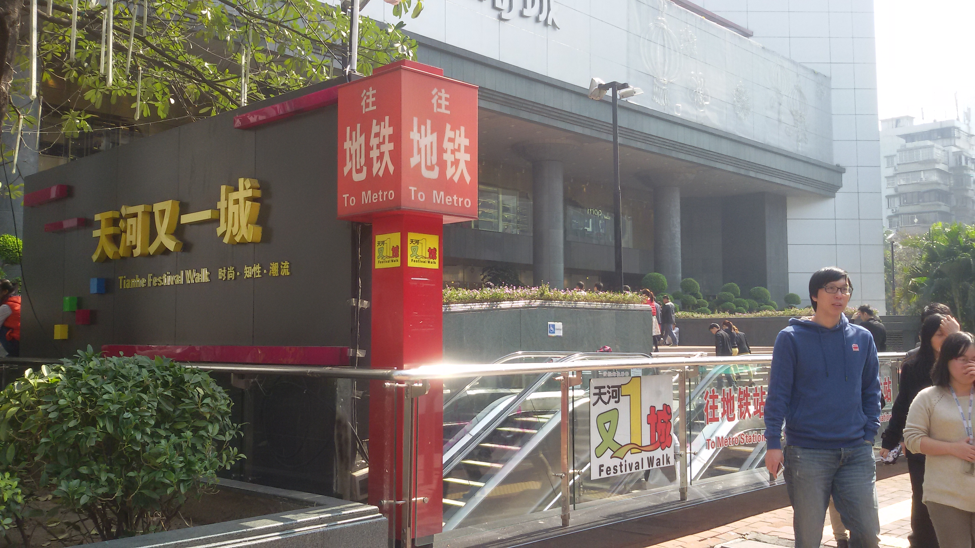 粵語: 天河又一城嘅入口（喜來登酒店附近）